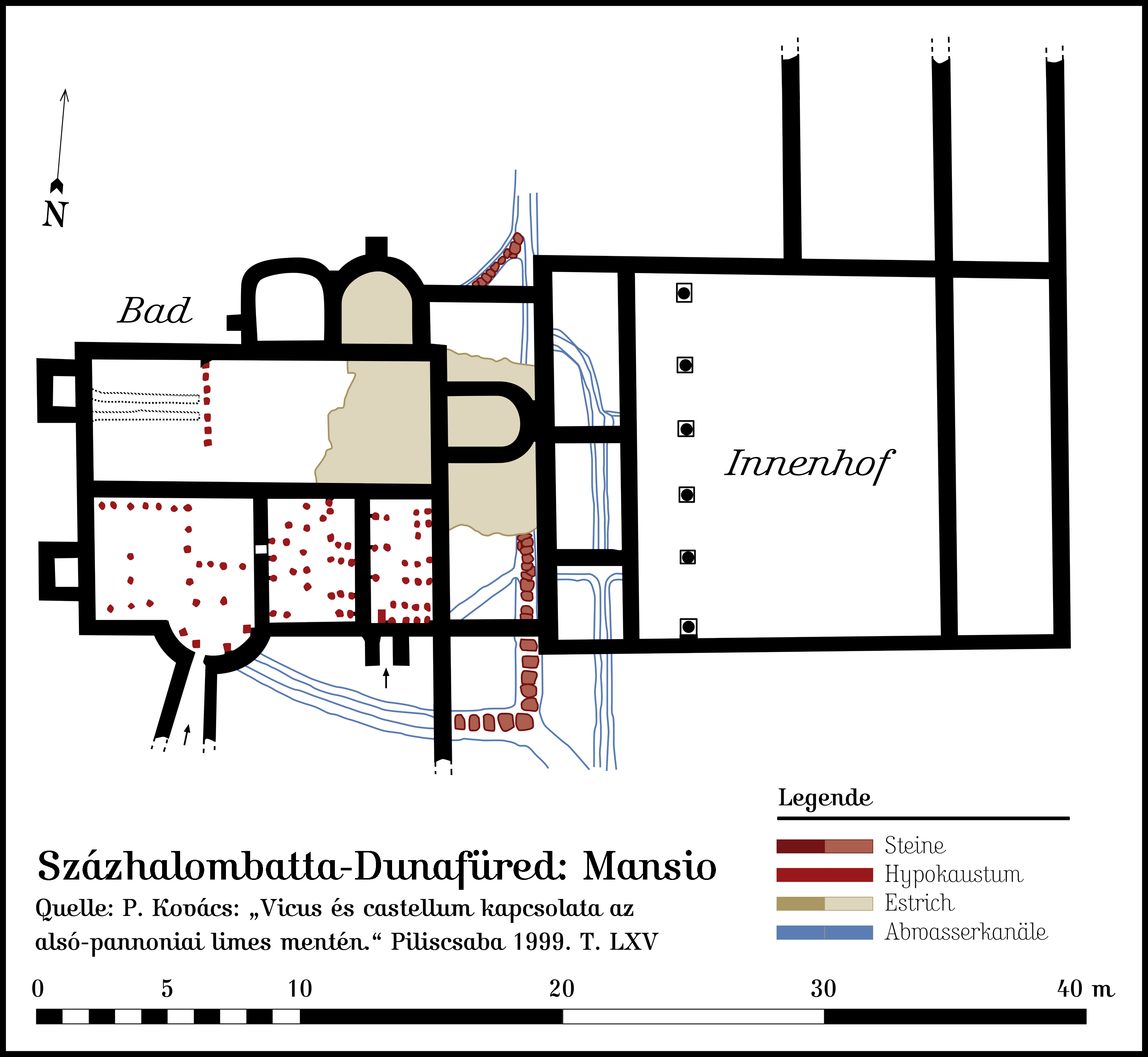 Vicus des Kastells Százhalombatta-Dunafüred (Matrica, Ungarn): Mansio (römische Straßenstation). Die Quelle zu diesem Grundriß ist in der Zeichnung angeben.